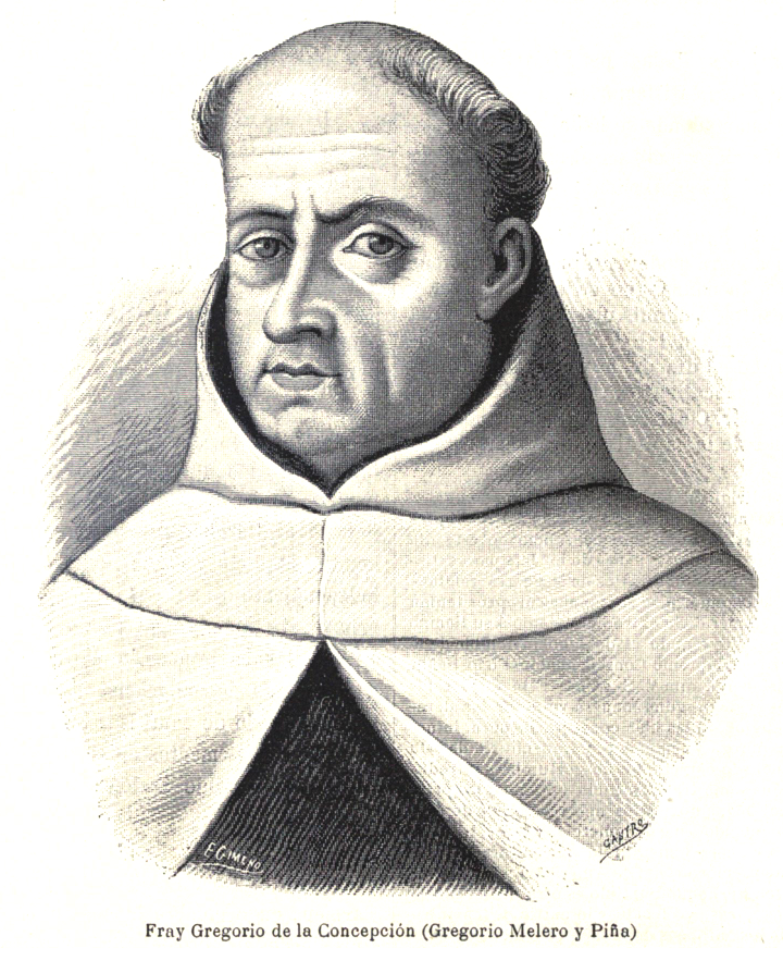 Imagen extraida del libro de Vicente Riva Palacio, Julio Zárate (1880) "México a través de los siglos" Tomo III: "La guerra de independencia" (1808 - 1821)